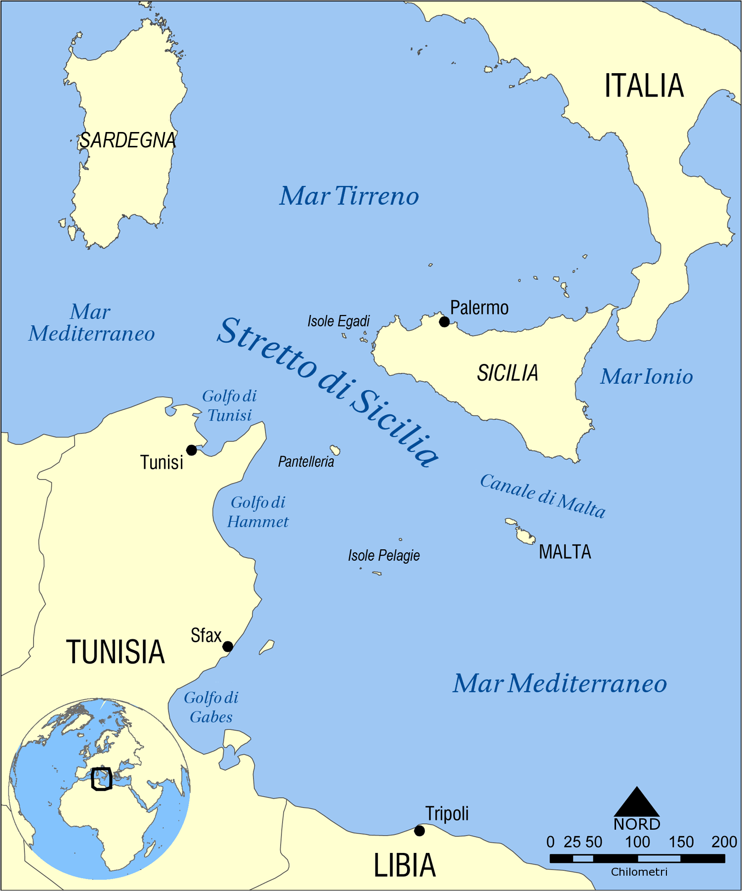 tradotto dalla versione inglese di Strait of Sicily map.png